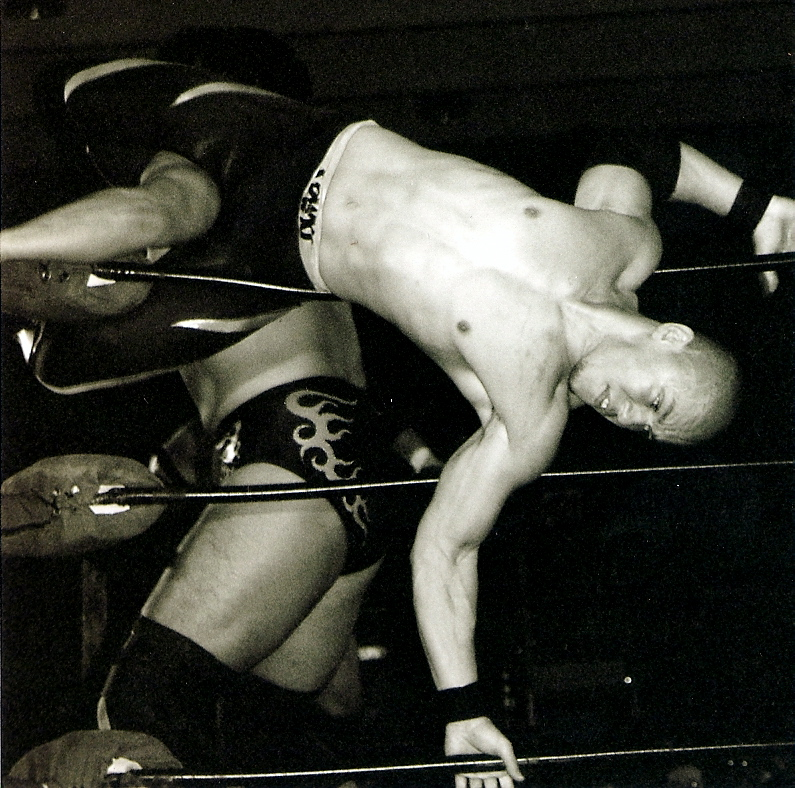 low ki perfomring a kick